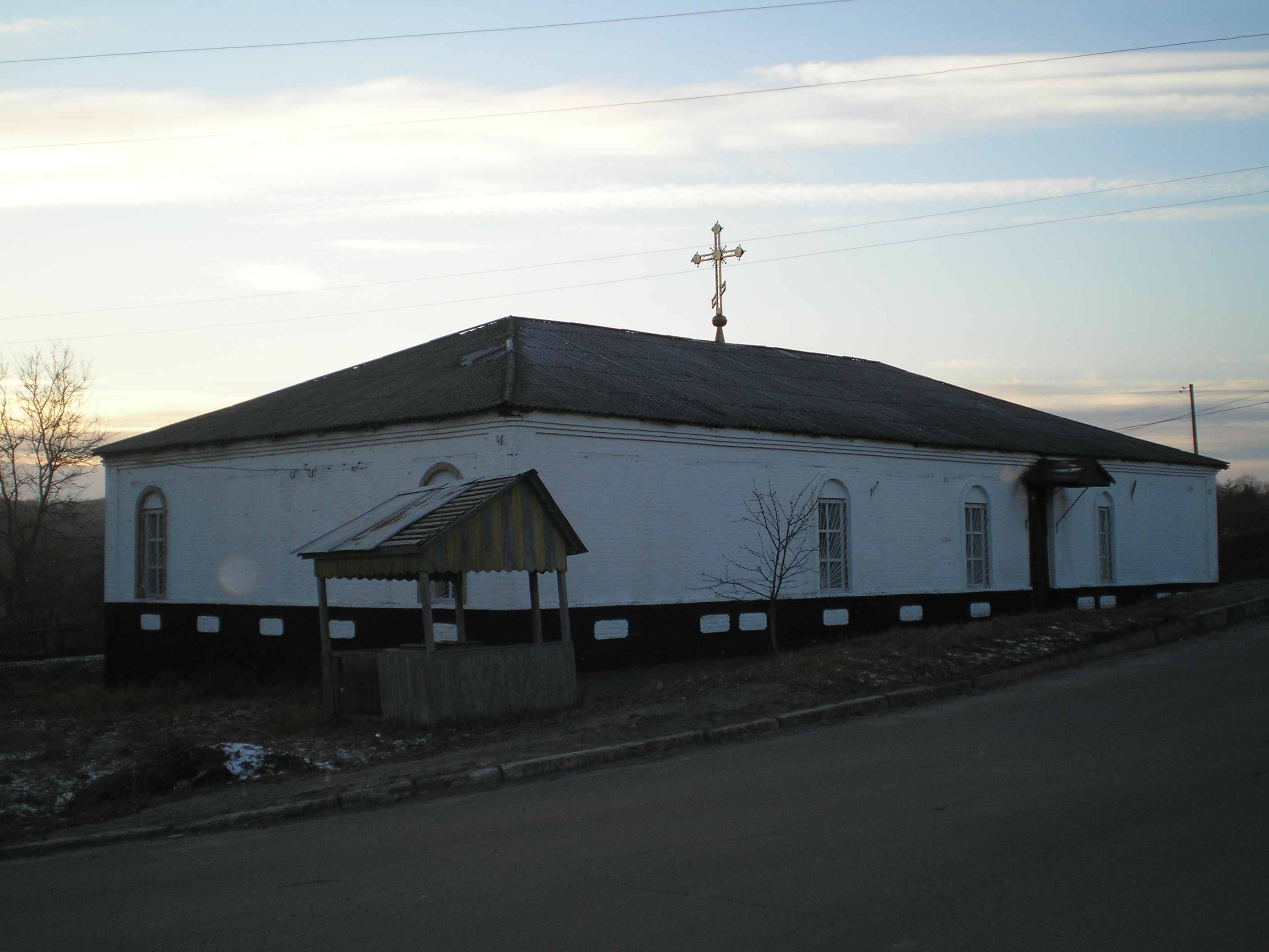 Церква св. апостола і євангелиста Івана Богослова, с. Терни Лубенського р-ну Полтавської обл.